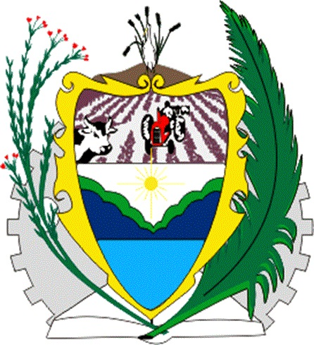 Escudo Provincial de Bagua